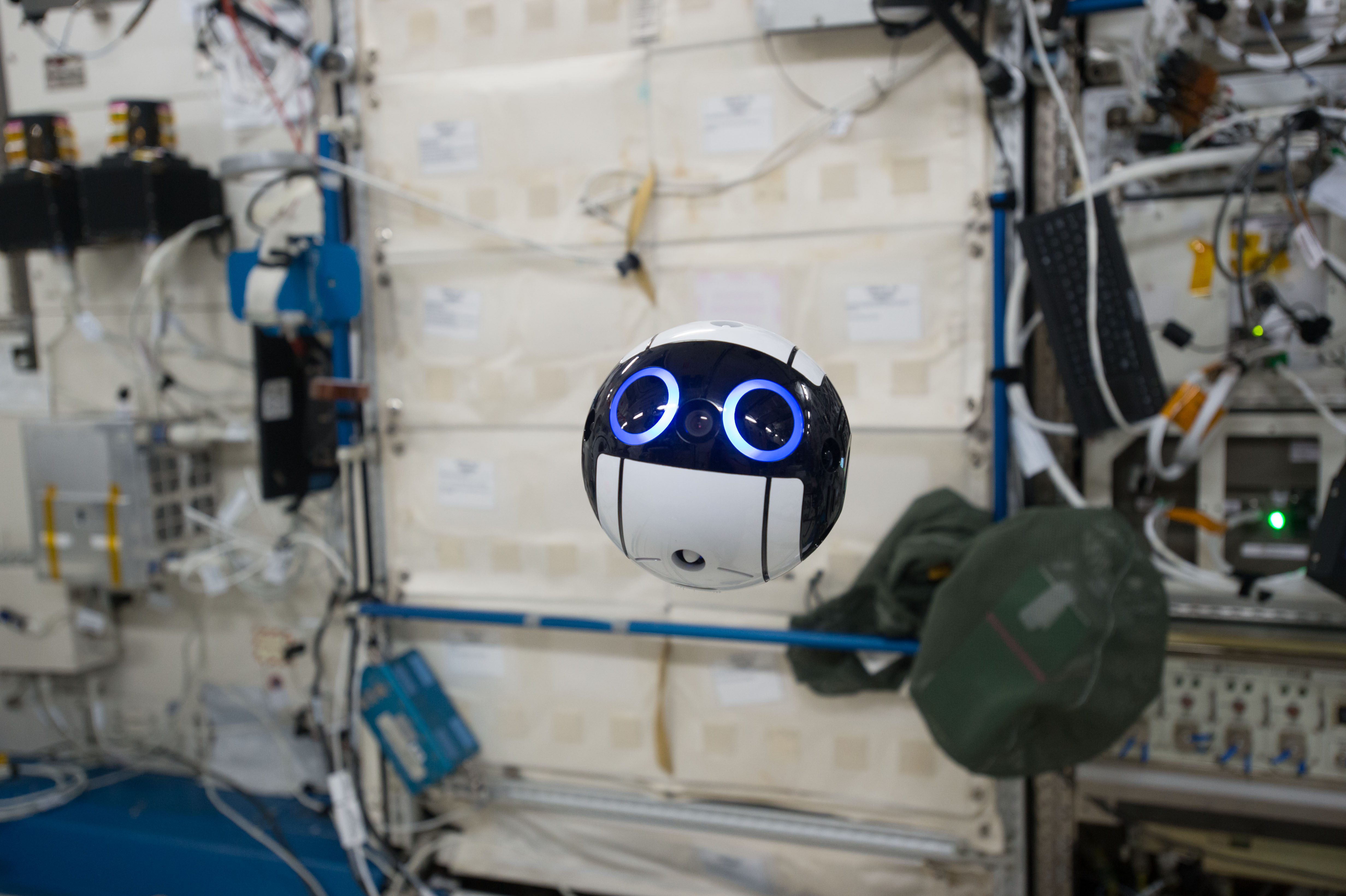 Int-Ball, Kameradrohne zur Dokumentation von Arbeiten auf der ISS